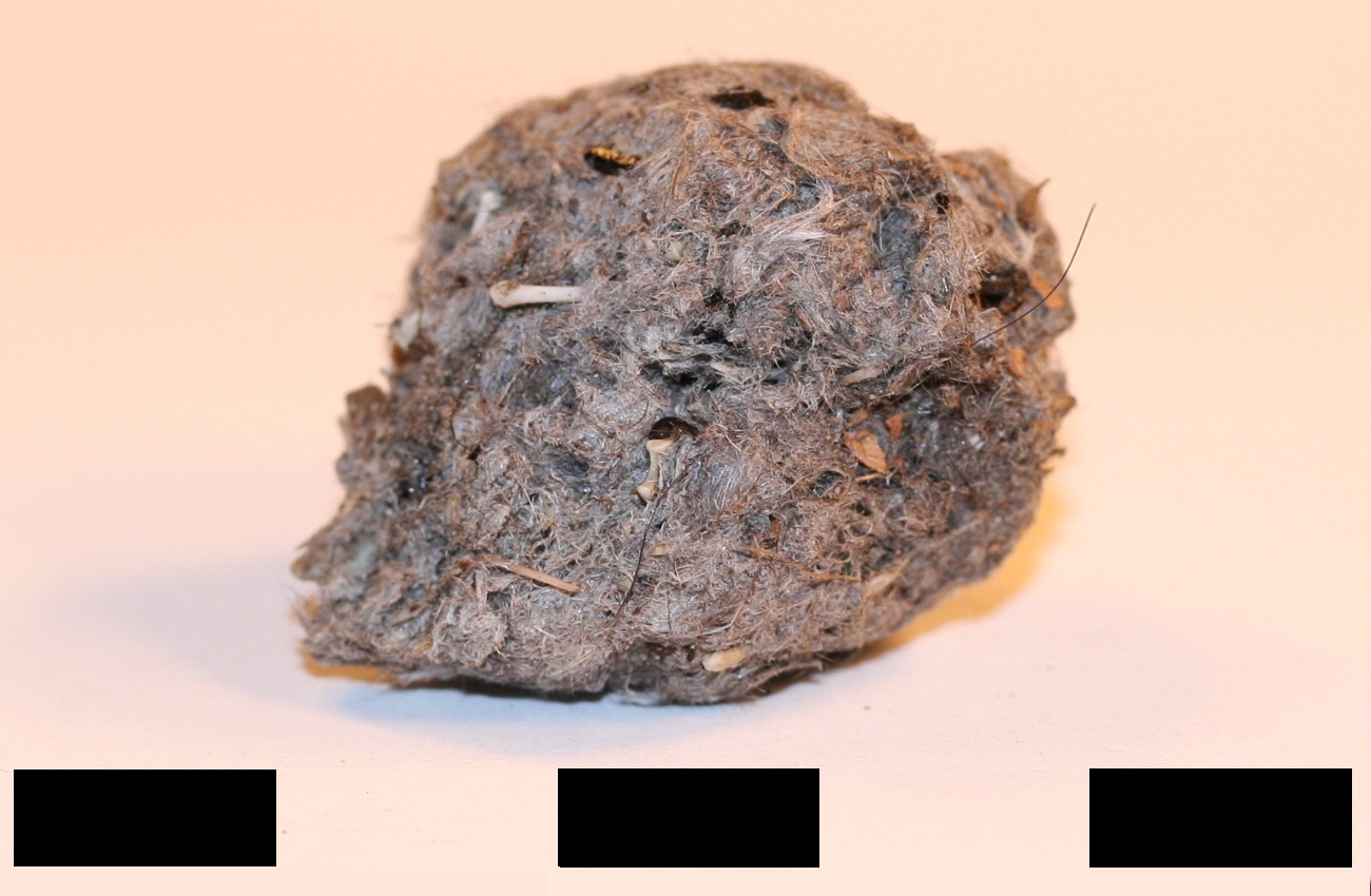 Eilekatz